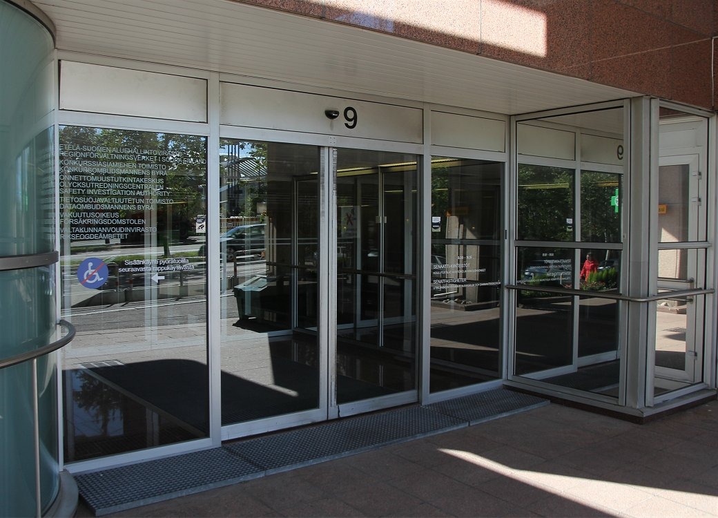 Valtion Ratapihantie 9:n toimistorakennuksen pääsisäänkäynti Helsingin Pasilassa. Kesällä 2016 tässä Senaatti-kiinteistöjen omistamassa rakennuksessa toimivat Etelä-Suomen aluehallintovirasto, Konkurssiasiamiehen toimisto, Onnettomuustutkintakeskus, Tietosuojavaltuutetun toimisto, Vakuutusoikeus ja Valtakunnanvoudinvirasto.